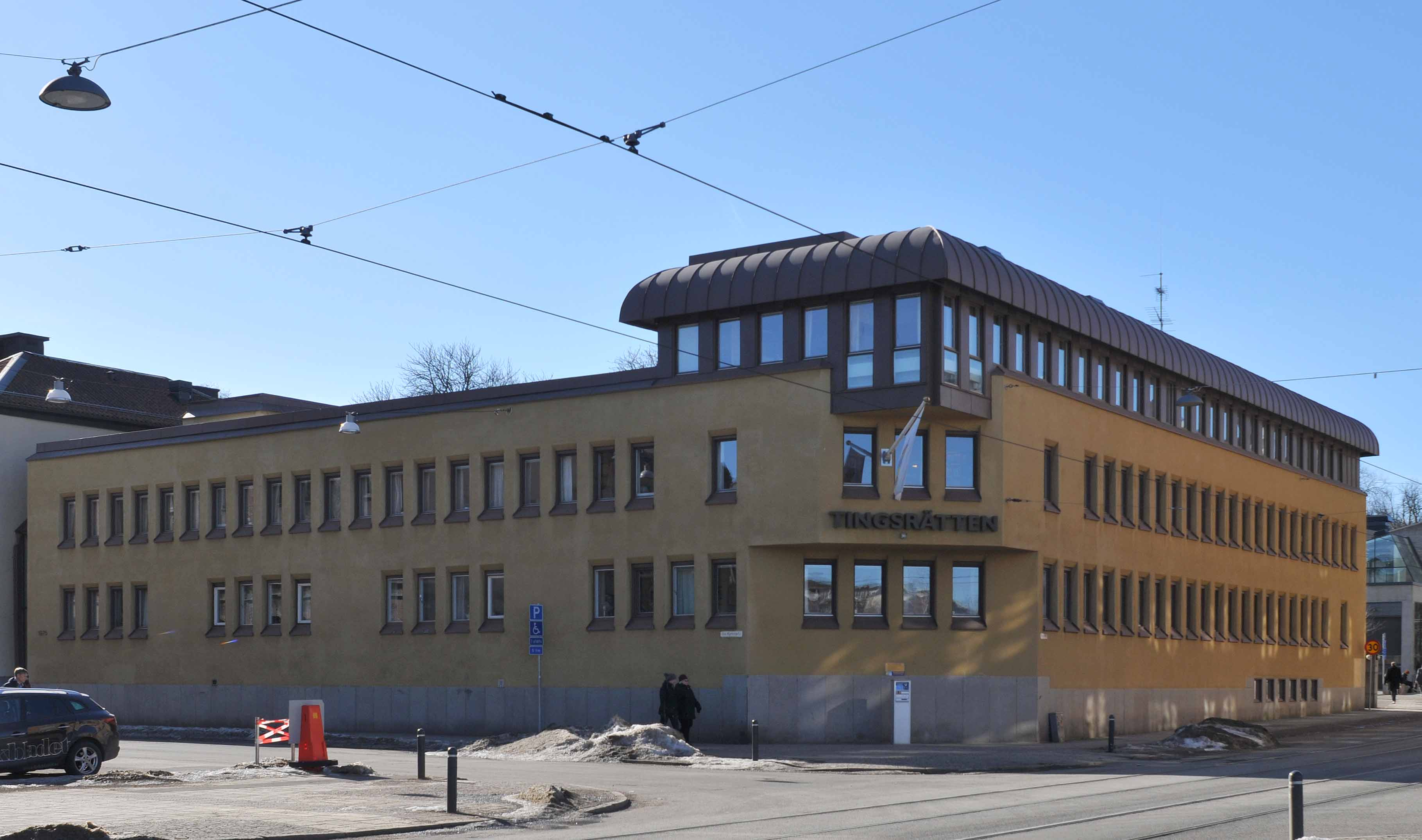 Tingsrätten i Norrköping.